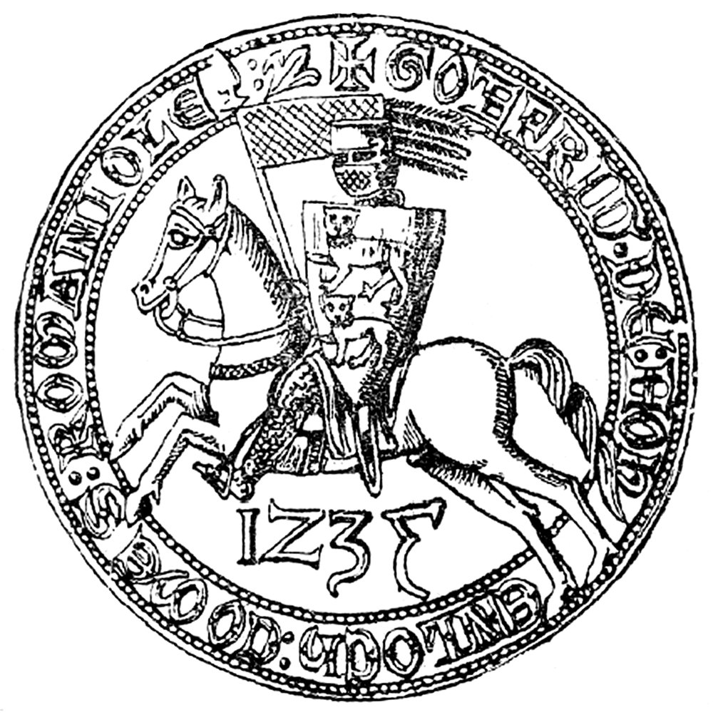 Gottfried von Hohenlohe, Grafen von Romaniola- 1235